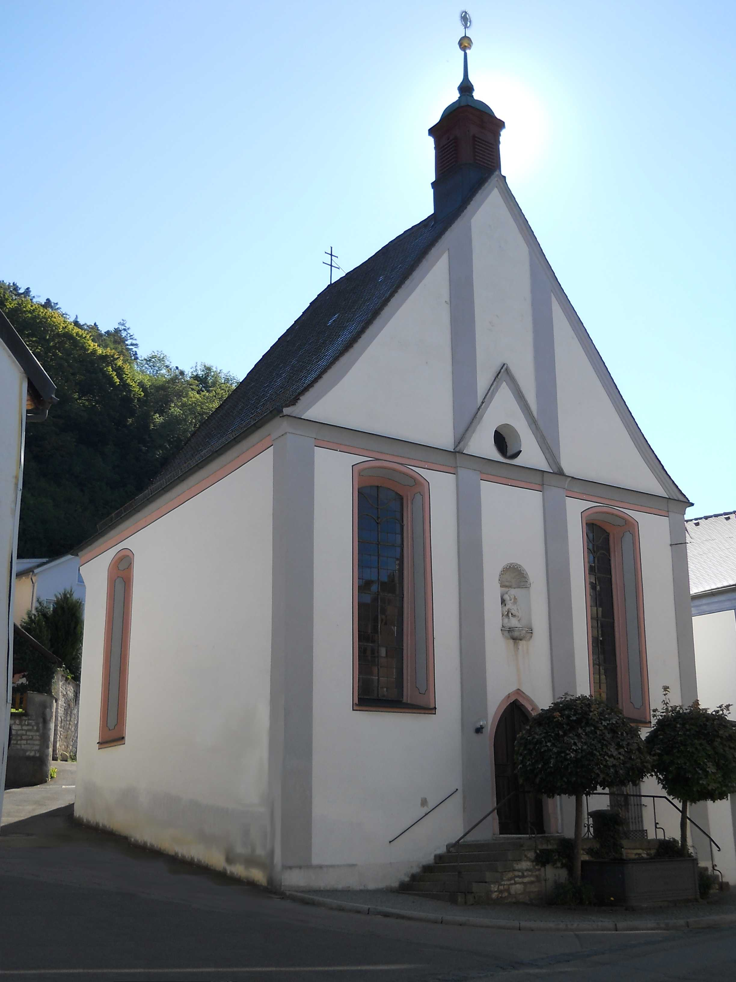 Barocke Mariahilf-Kapelle in Eichstätt/Oberbayern